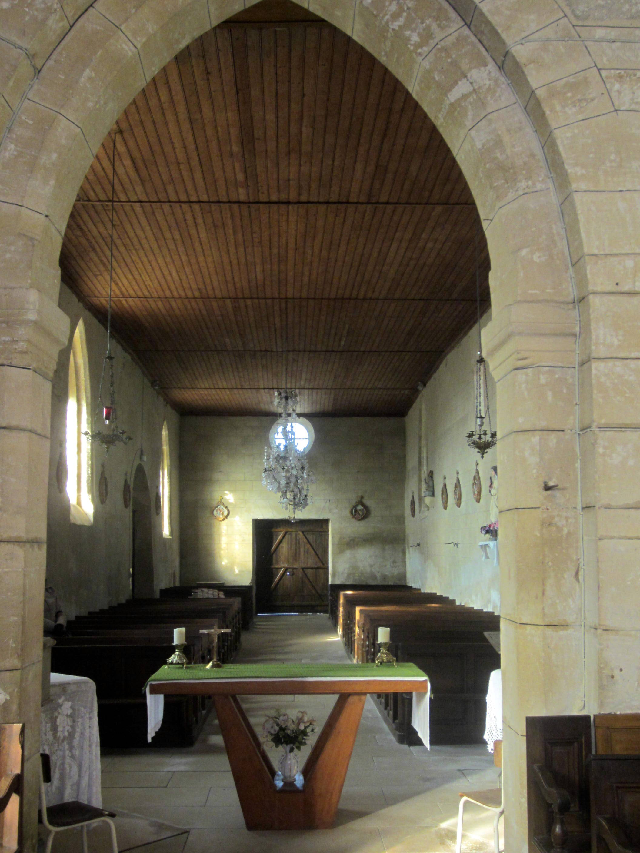 Nef vue du cœur où a été récemment installé un autel moderne pour la célébration des offices